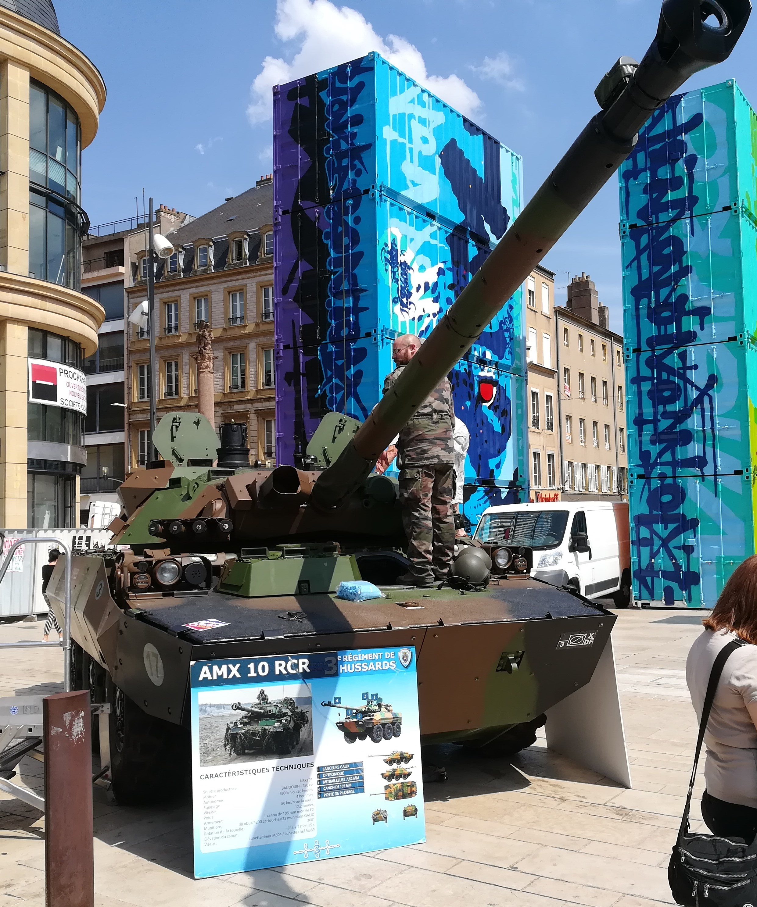 AMX-10 RCR du 3ème régiment de hussards à la Place de la République de Metz le 13 juillet 2018